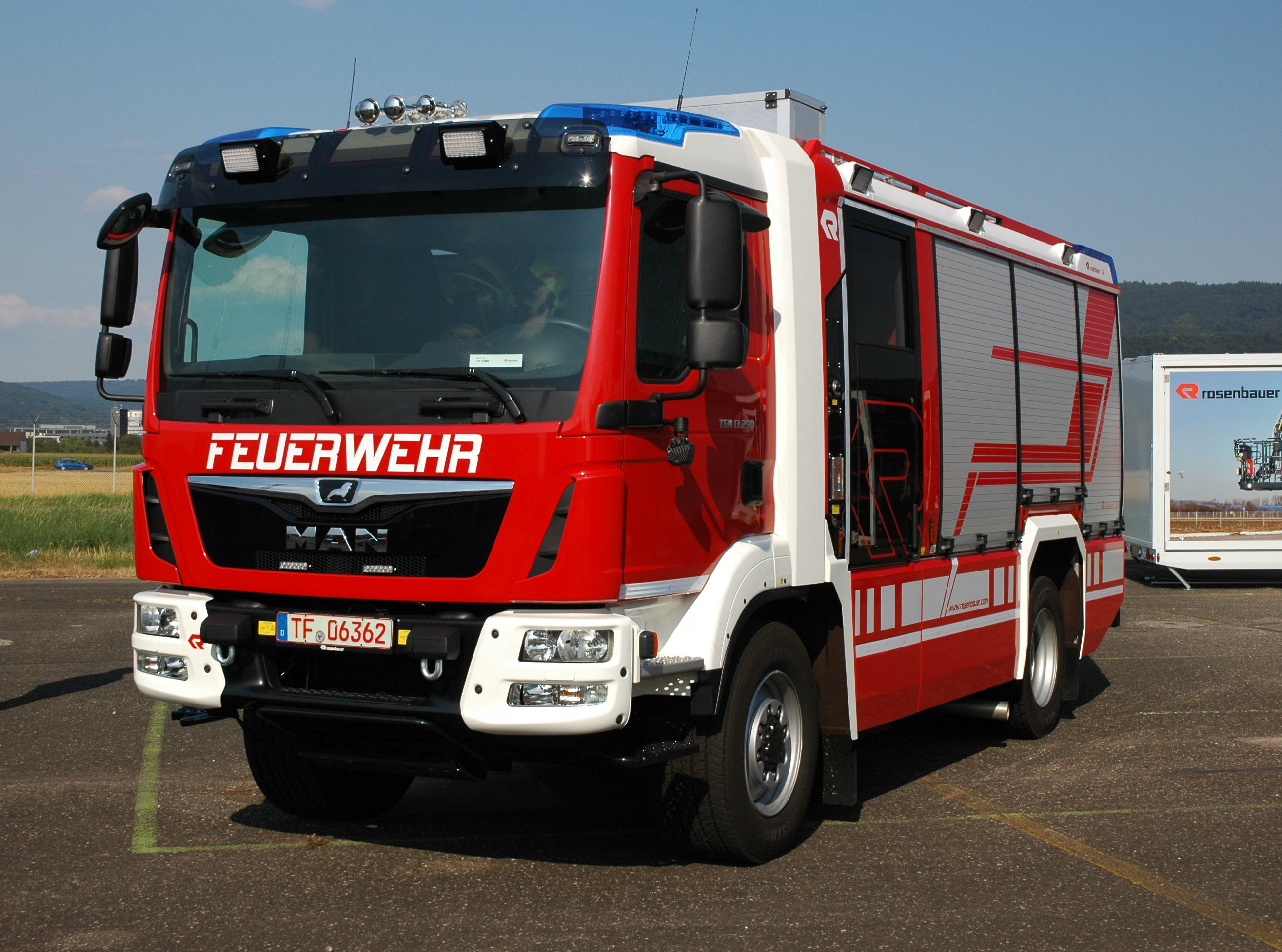 Heidelberg Airfield - MAN TGM